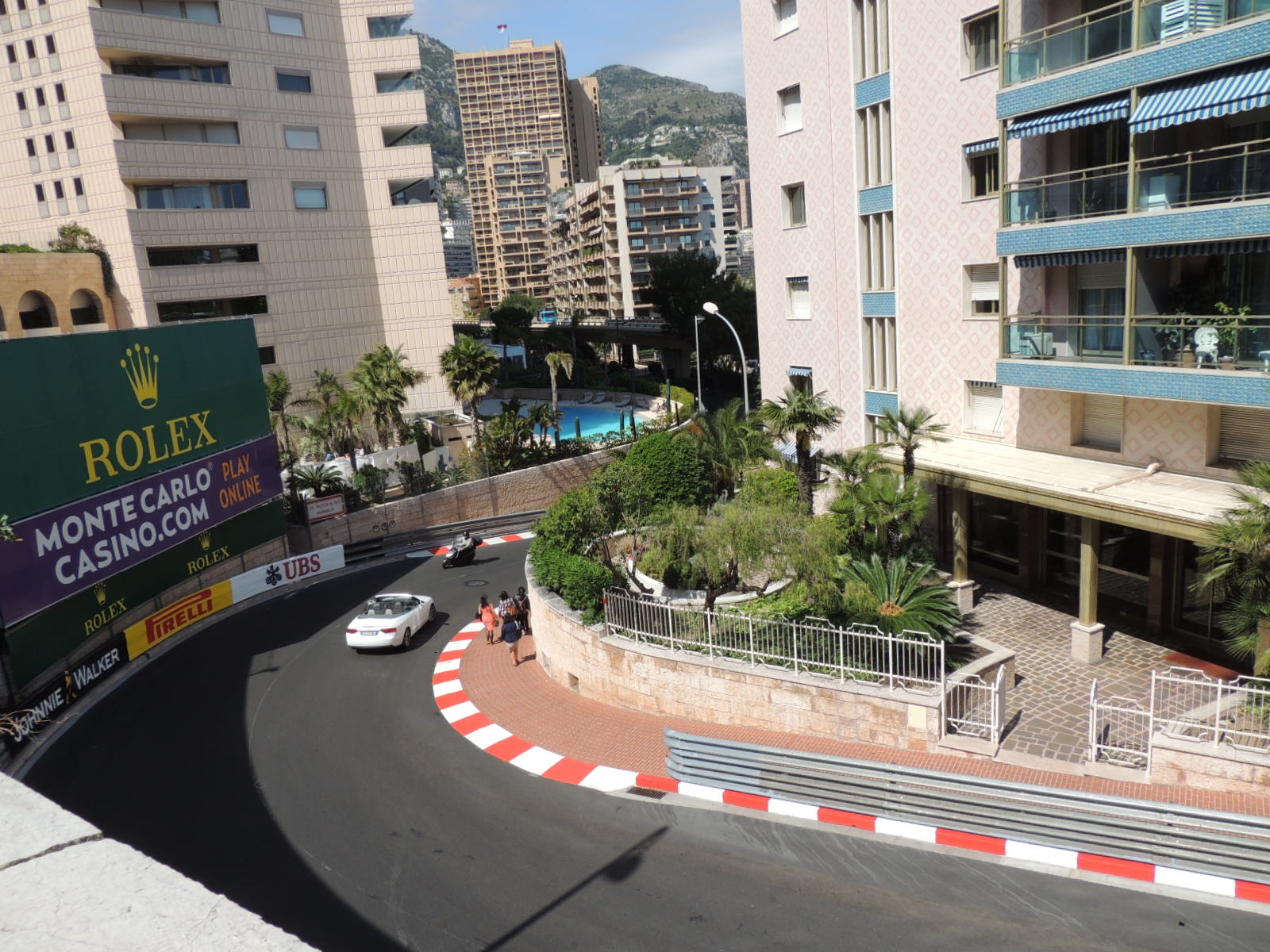 monaco preparing grand prix 2014